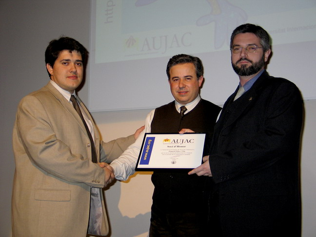 Entrega del Soci d'Honor 2004, a Eduard Elias (dreta), degá del Col.legi Oficial d'Enginyers Informatics.